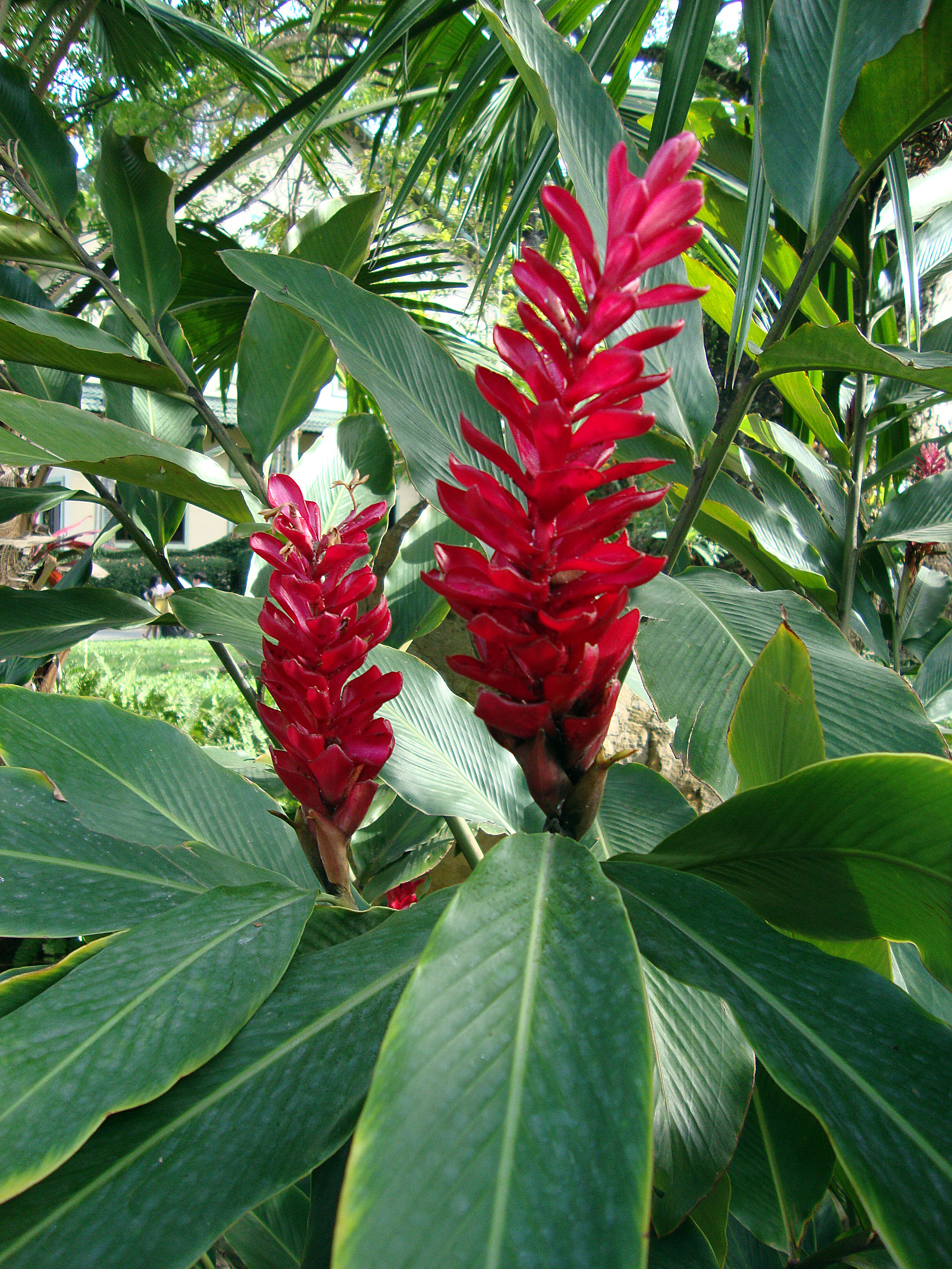 Alpinia purpurata (Vieill.) K.Schum, 1904